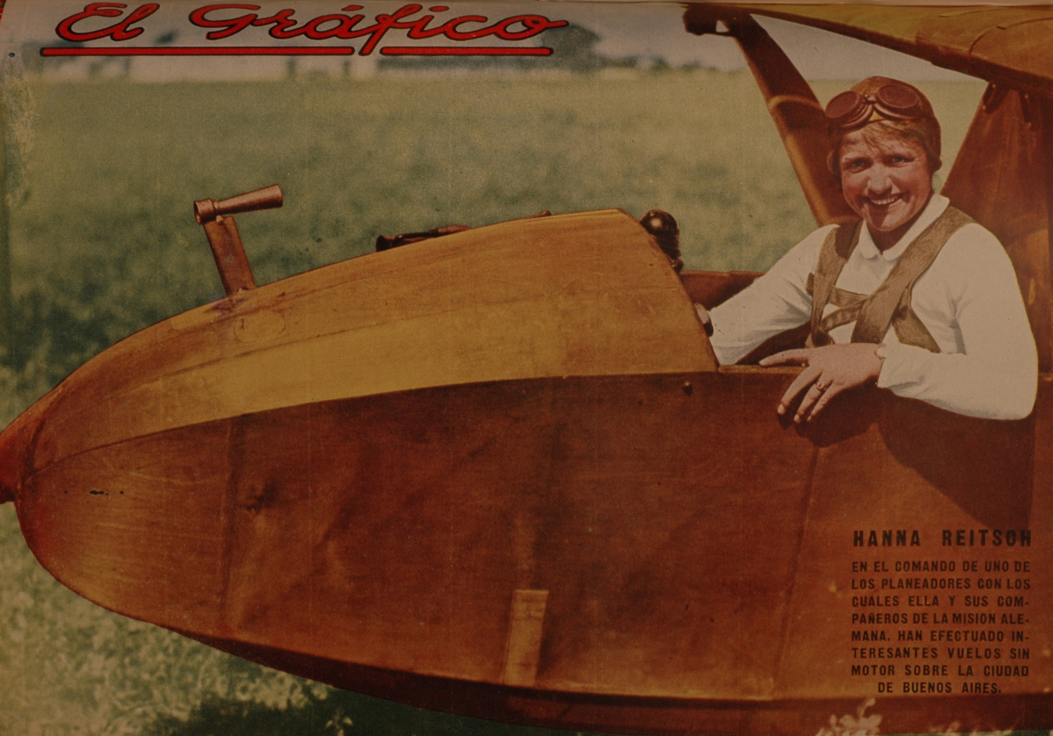 El Grafico del 07 de Abril de 1934. Edicion 769